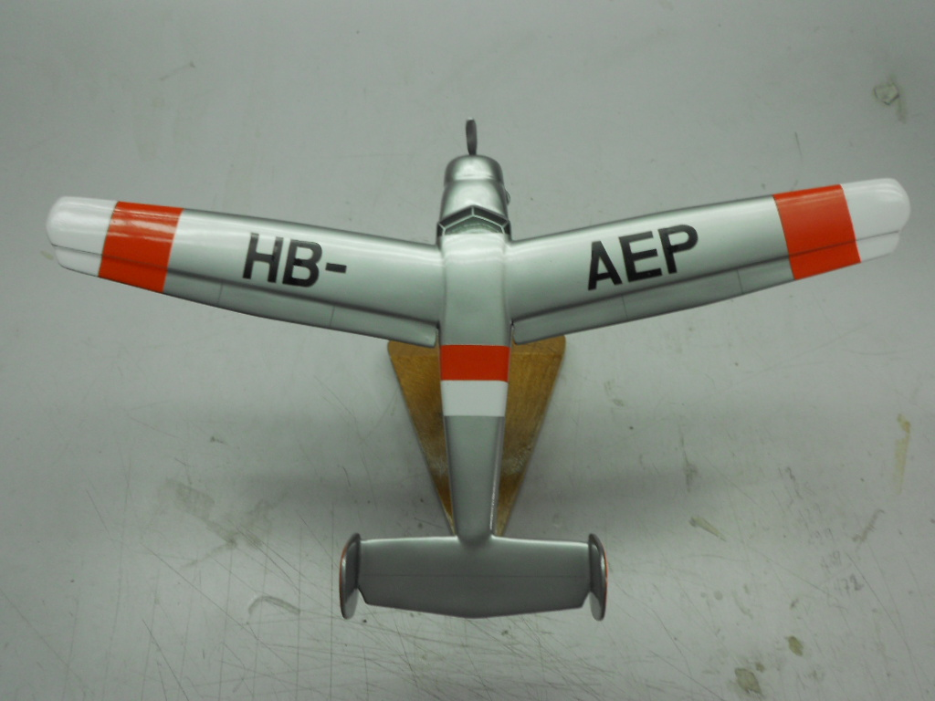 Pilatus SB-2 Pelican top